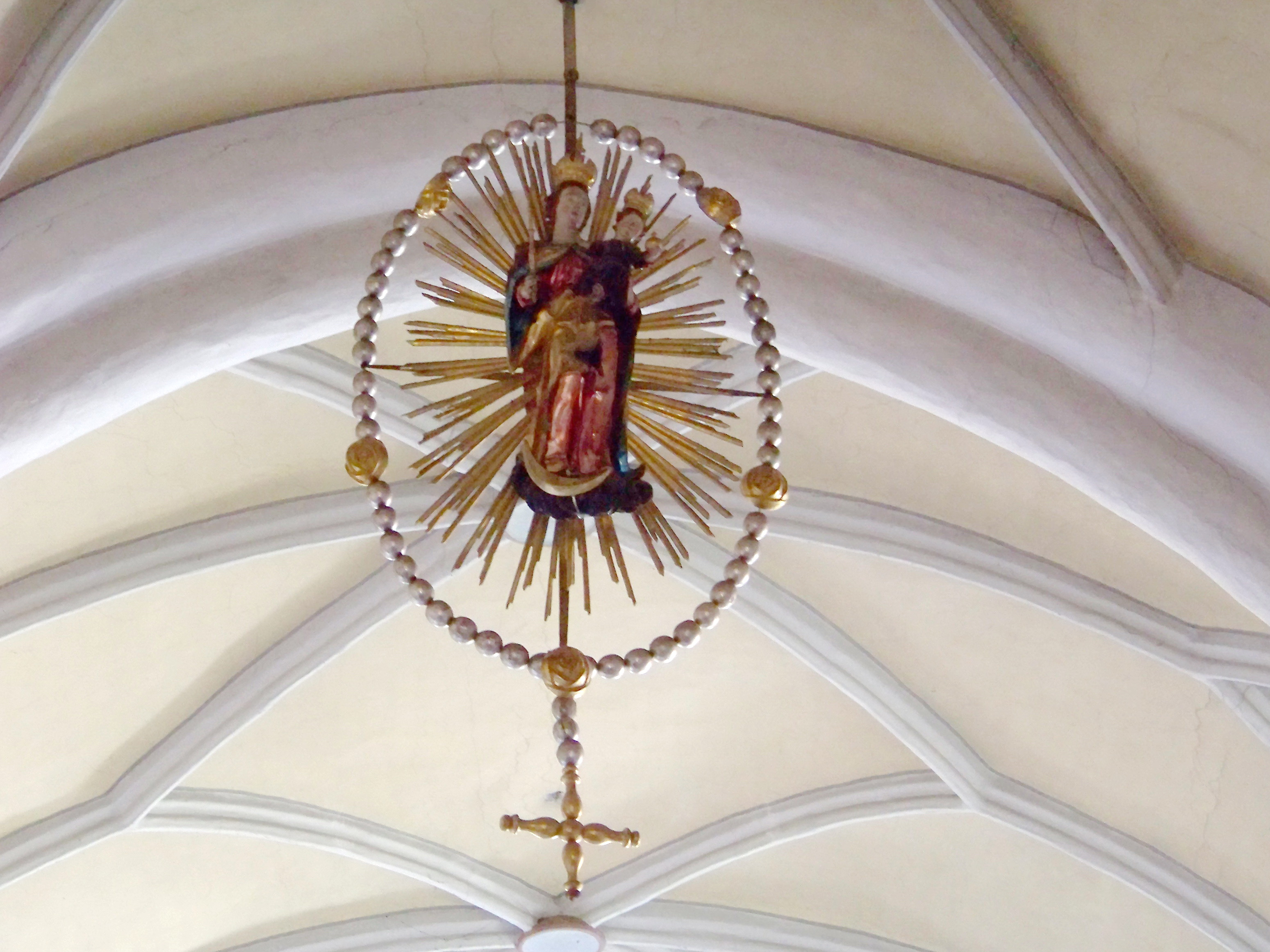 Essenbach, Rathausplatz 13. Katholische Kirche Mariä Himmelfahrt. Rosenkranzmadonna am Chorbogen.